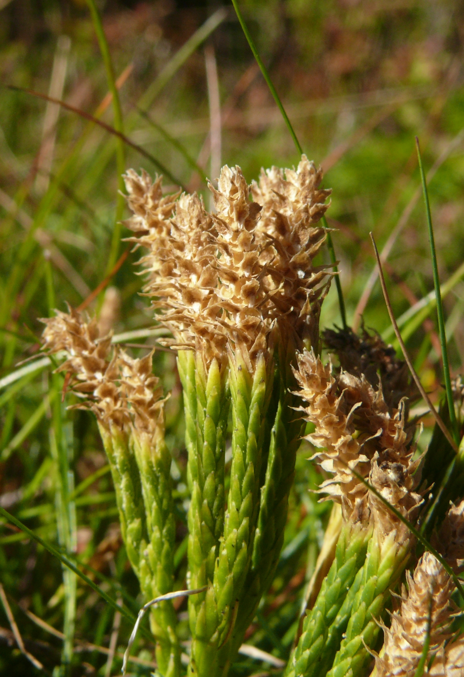 Diphasiastrum alpinum, Nordschwarzwald, Deutschland